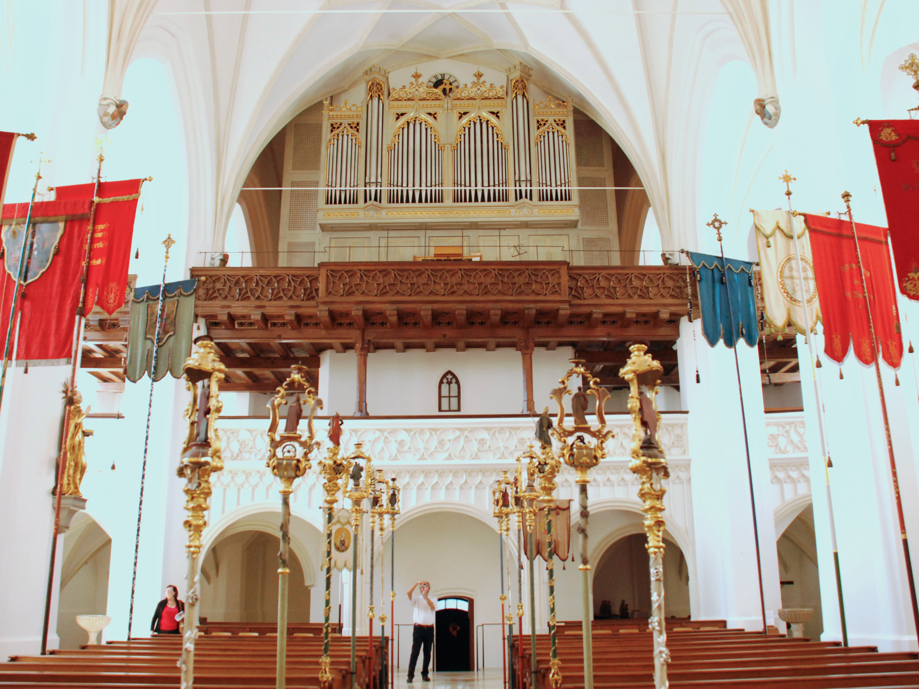 Empore der katholischen Stadtpfarrkirche Mariae Himmelfahrt in Bad Tölz, Landkreis Bad Tölz-Wolfratshausen, Regierungsbezirk Oberbayern, Bayern. Als Baudenkmal in der Bayerischen Denkmalliste aufgeführt.